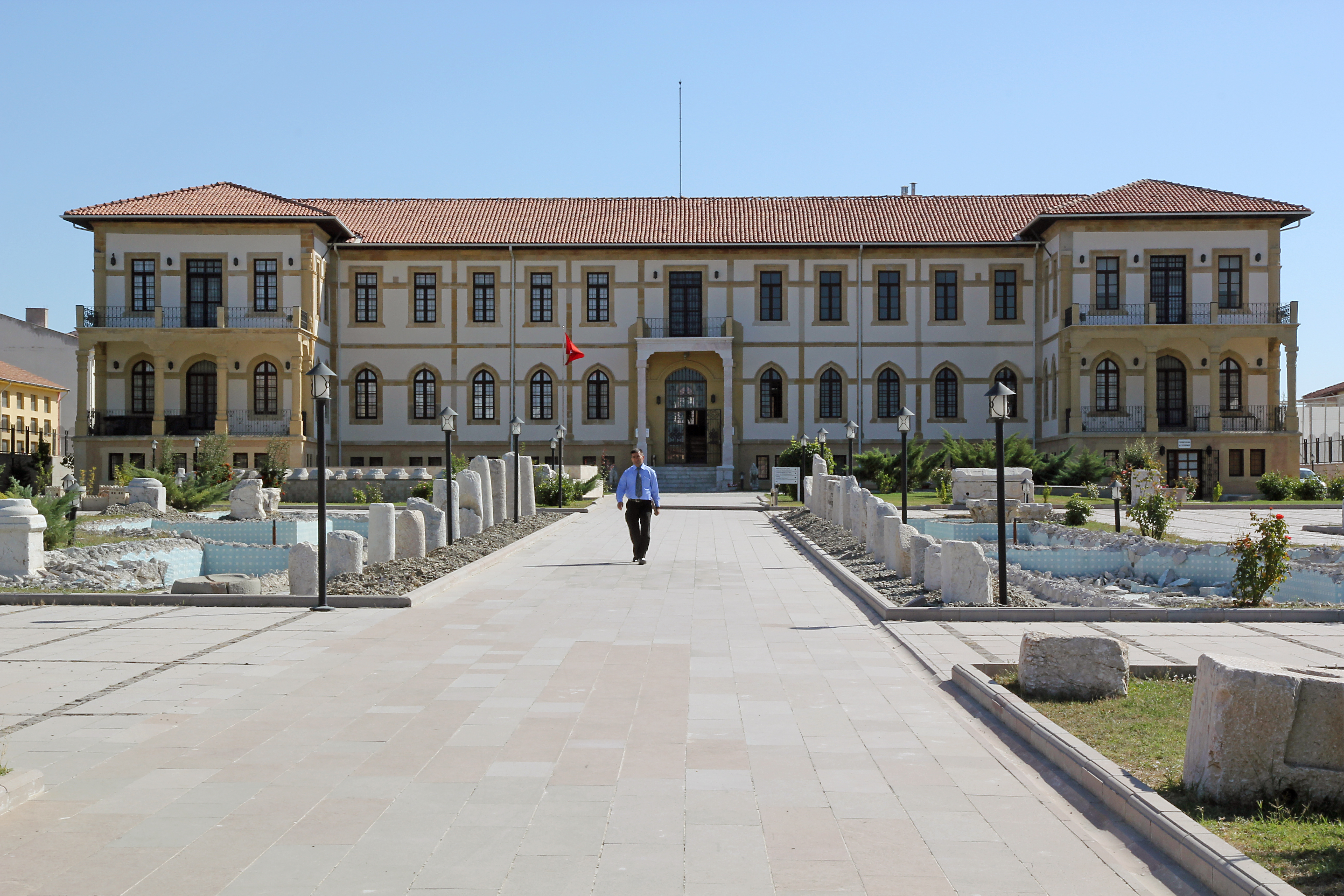 Archäologisches Museum Çorum, Zentraltürkei